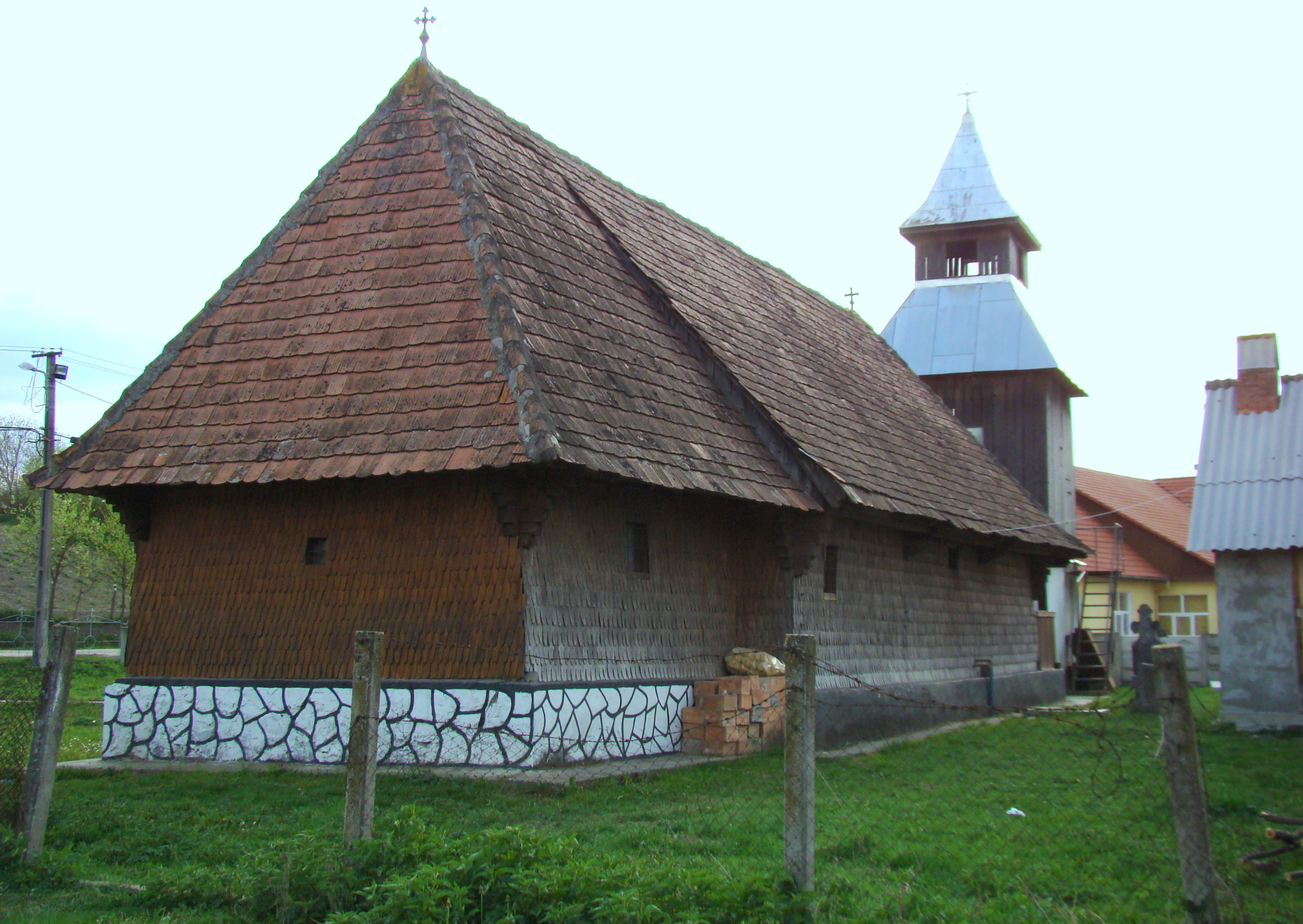 vedere de ansamblu din N-E